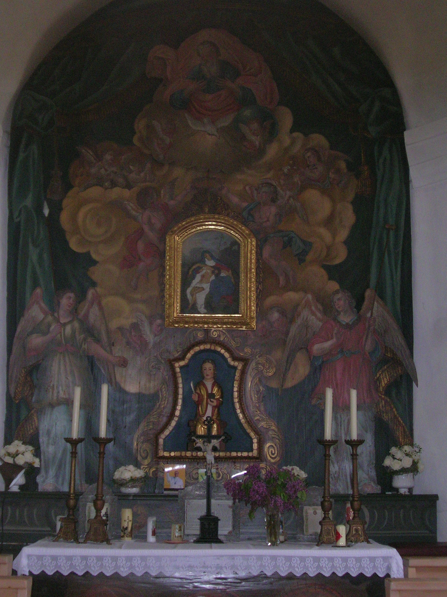 Katholische Filialkirche St. Bartholomäus in Flitzing - Innenraum(Gemeinde Zolling) This is a photograph of an architectural monument.